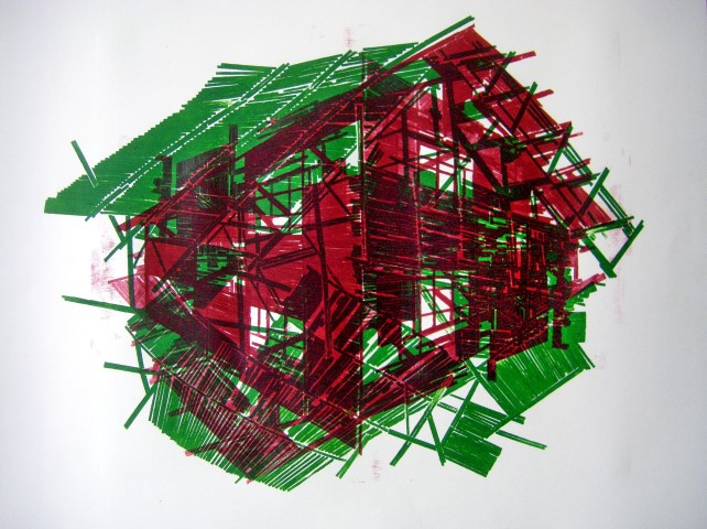 Thomas Ruch, Originaldruckgrafik, 2011